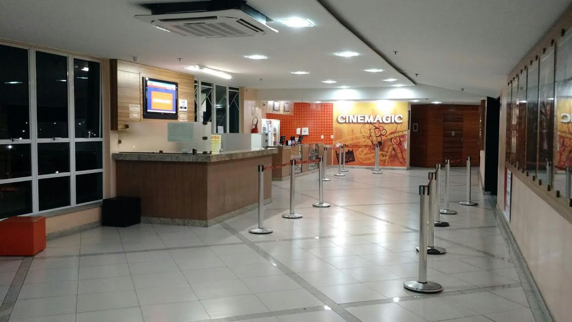 Corredor de acesso ao Cinemagic Rio das Ostras